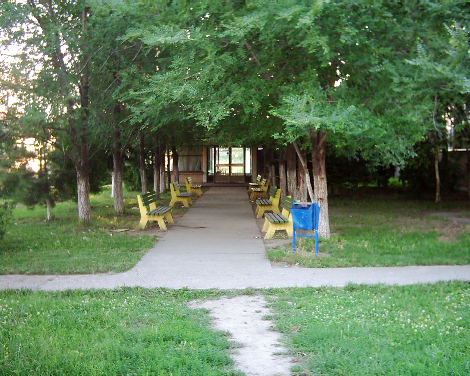 Srpski (latinica): Park iza škole u Kucuri, u Srbiji